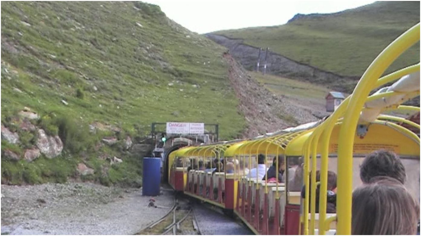 Le petit train d'Artouste le 25 juillet 2010.